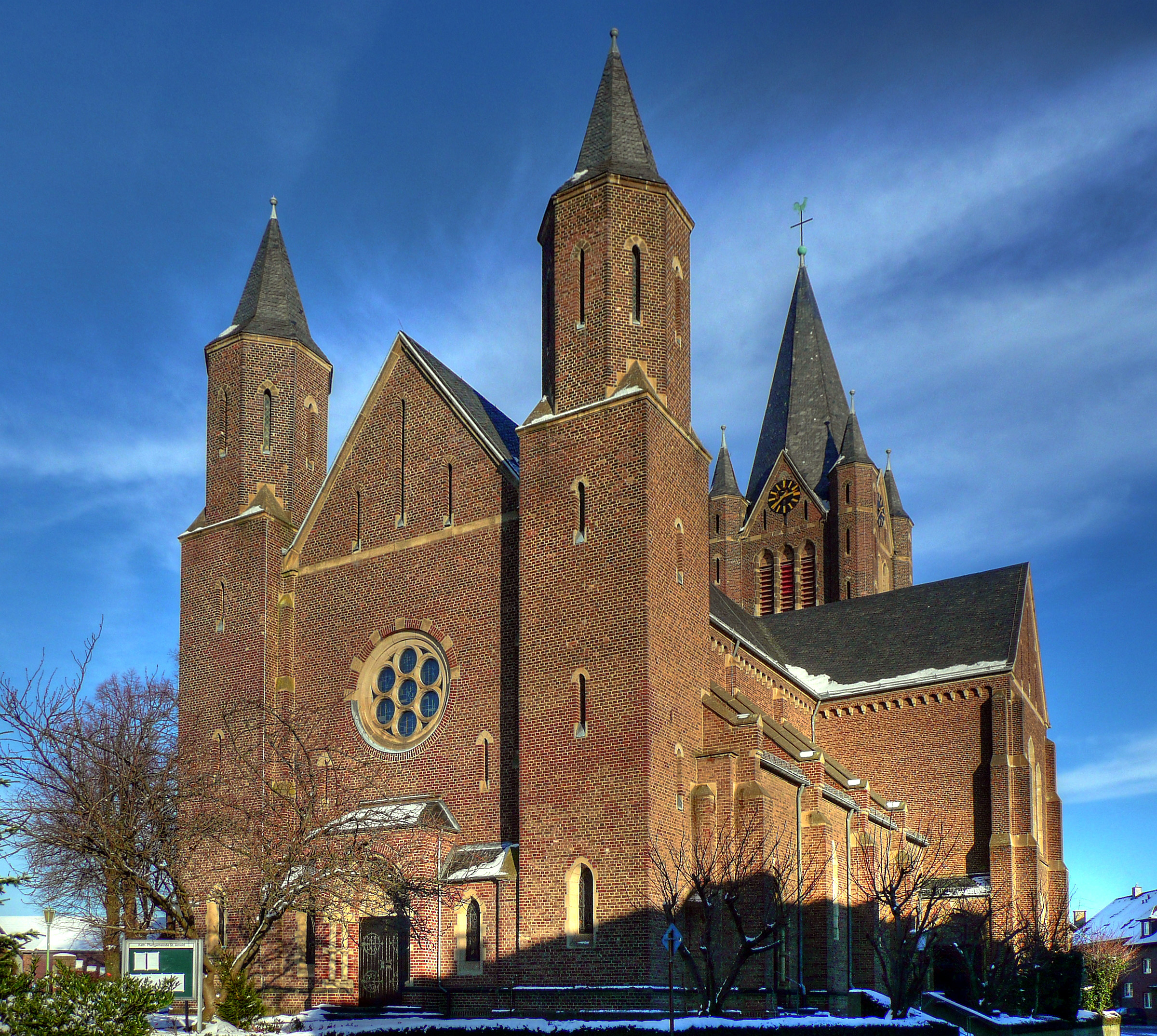 Katholische Pfarrkirche Groß St. Arnold in Arnoldsweiler